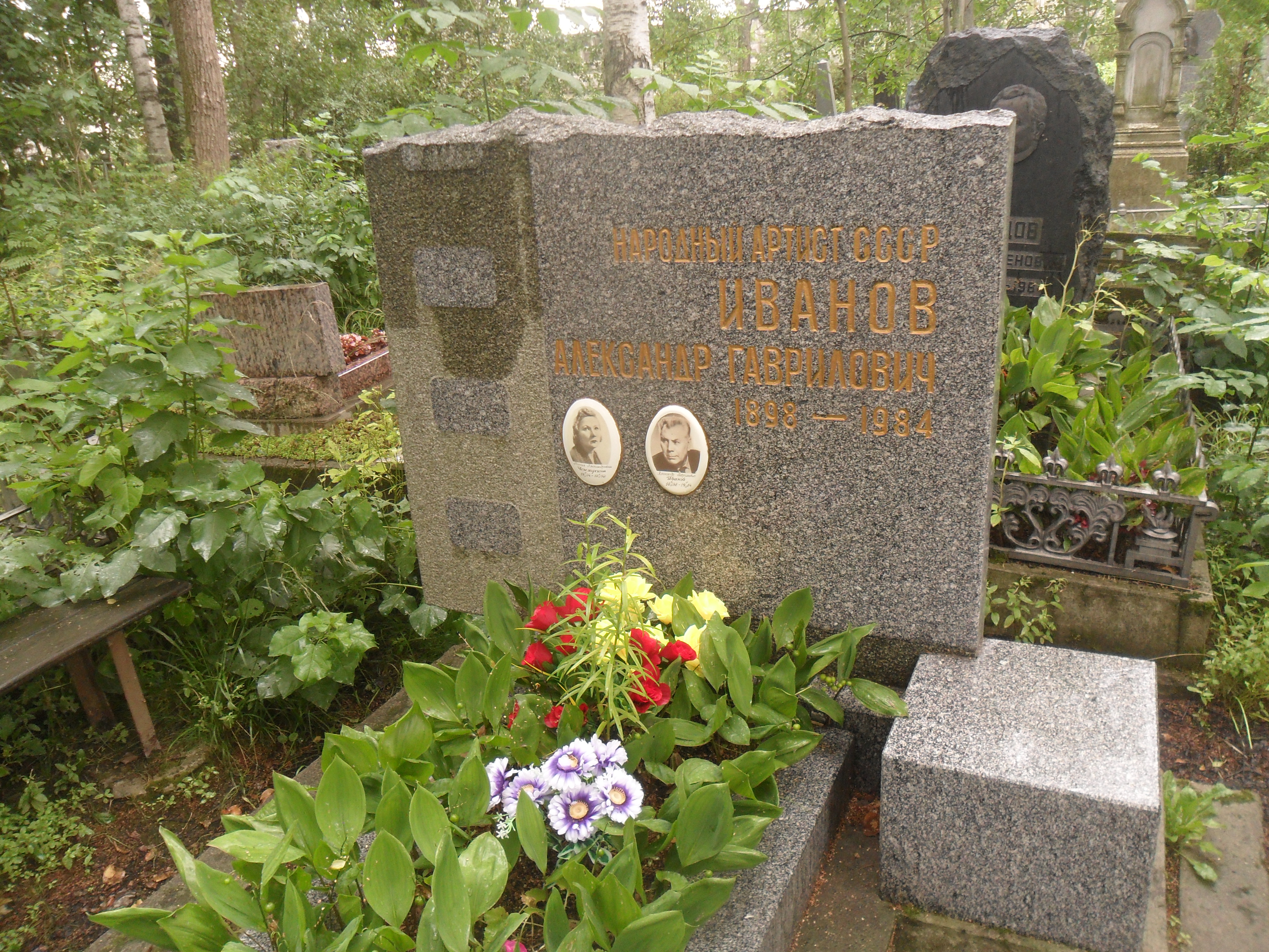 Могила народного артиста СССР Александра Иванова на Серафимовском кладбище Санкт-Петербурга.